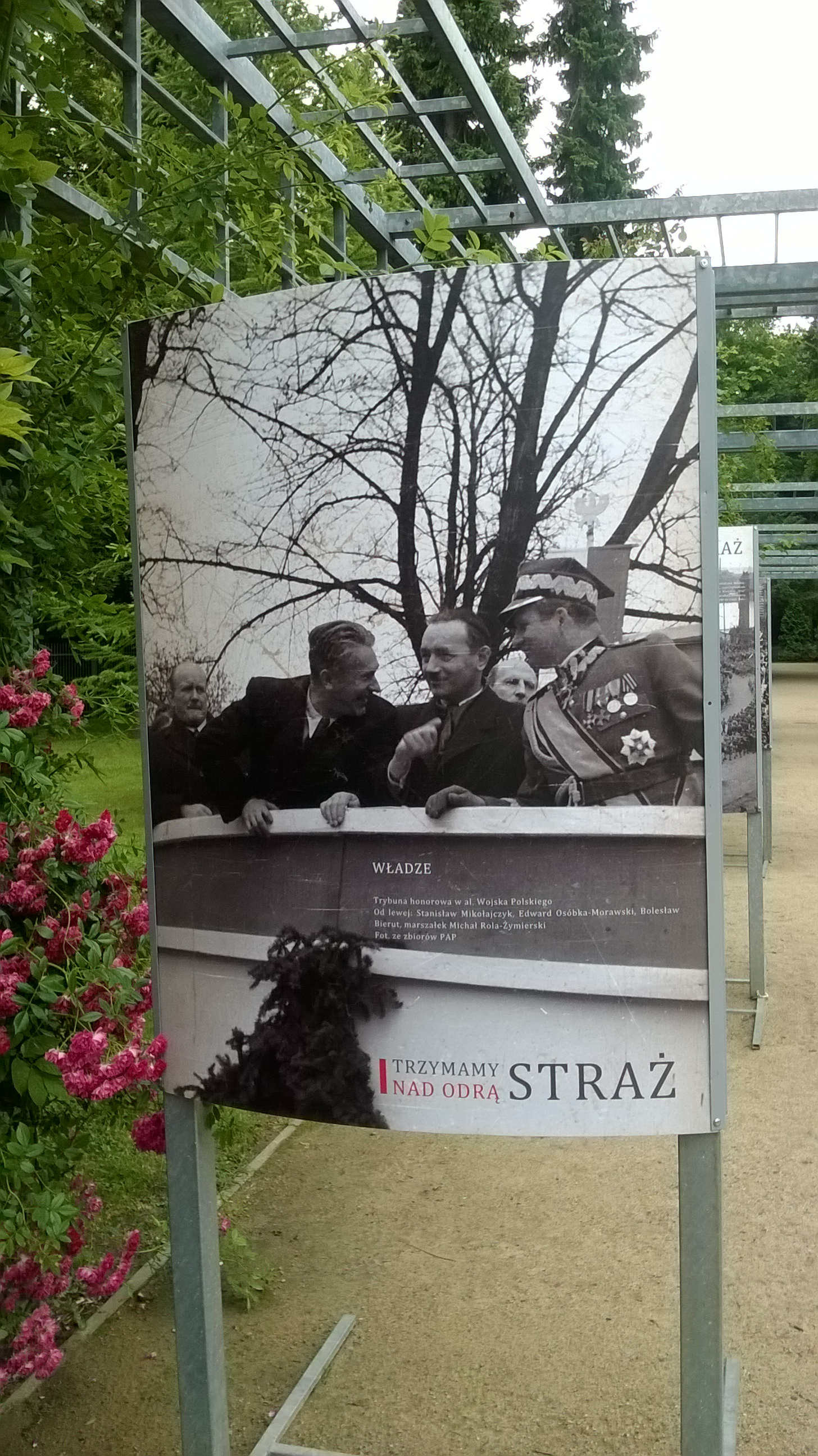 Wystawa historycznych fotografii w Ogrodzie Różanym w Szczecinie